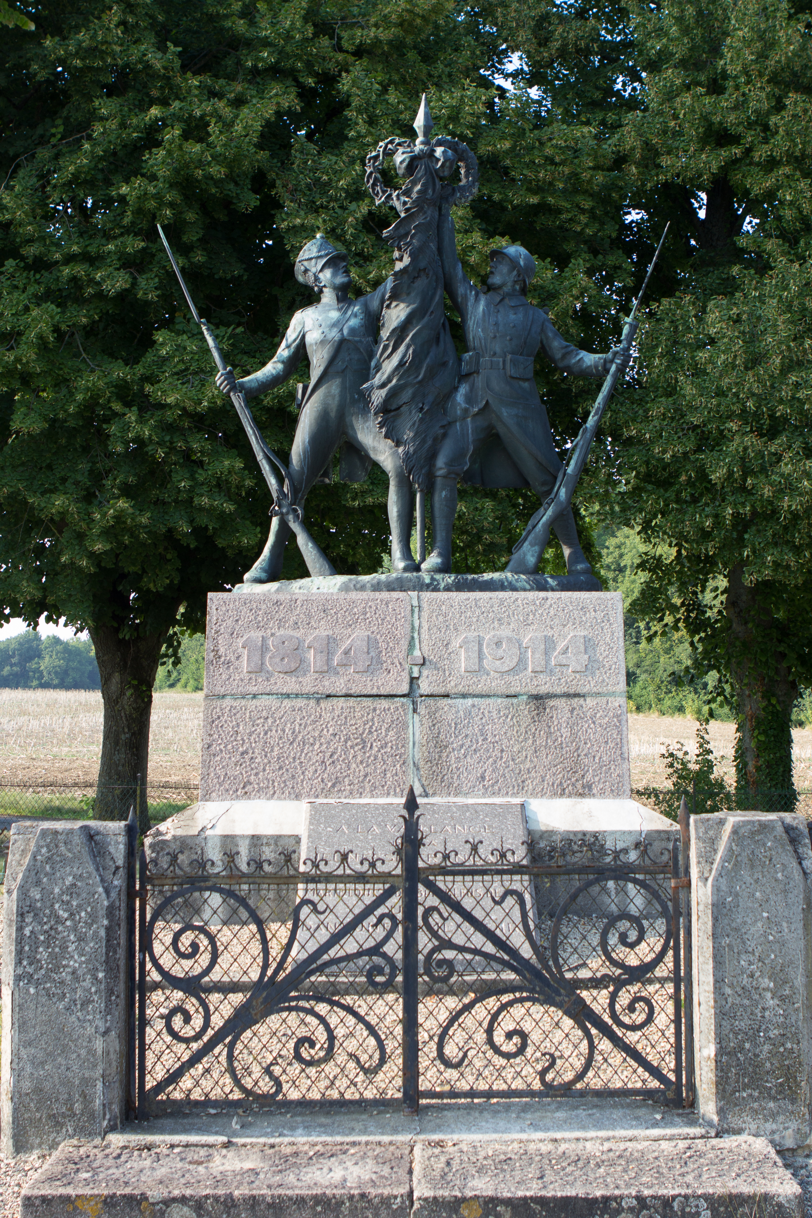 Hurtebise, Chemin des Dames, Bouconville-Vauclair , Aisne, France